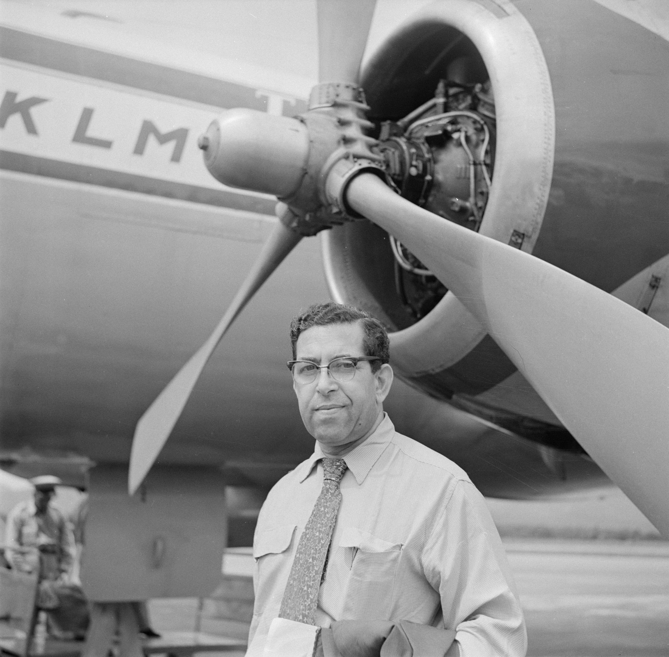 Albert Helman (pseudoniem van Lou Lichtveld) voor de Convair 340 van de KLM op het vliegveld Piarco van Port of Spain op Trinidad. 1 oktober 1955